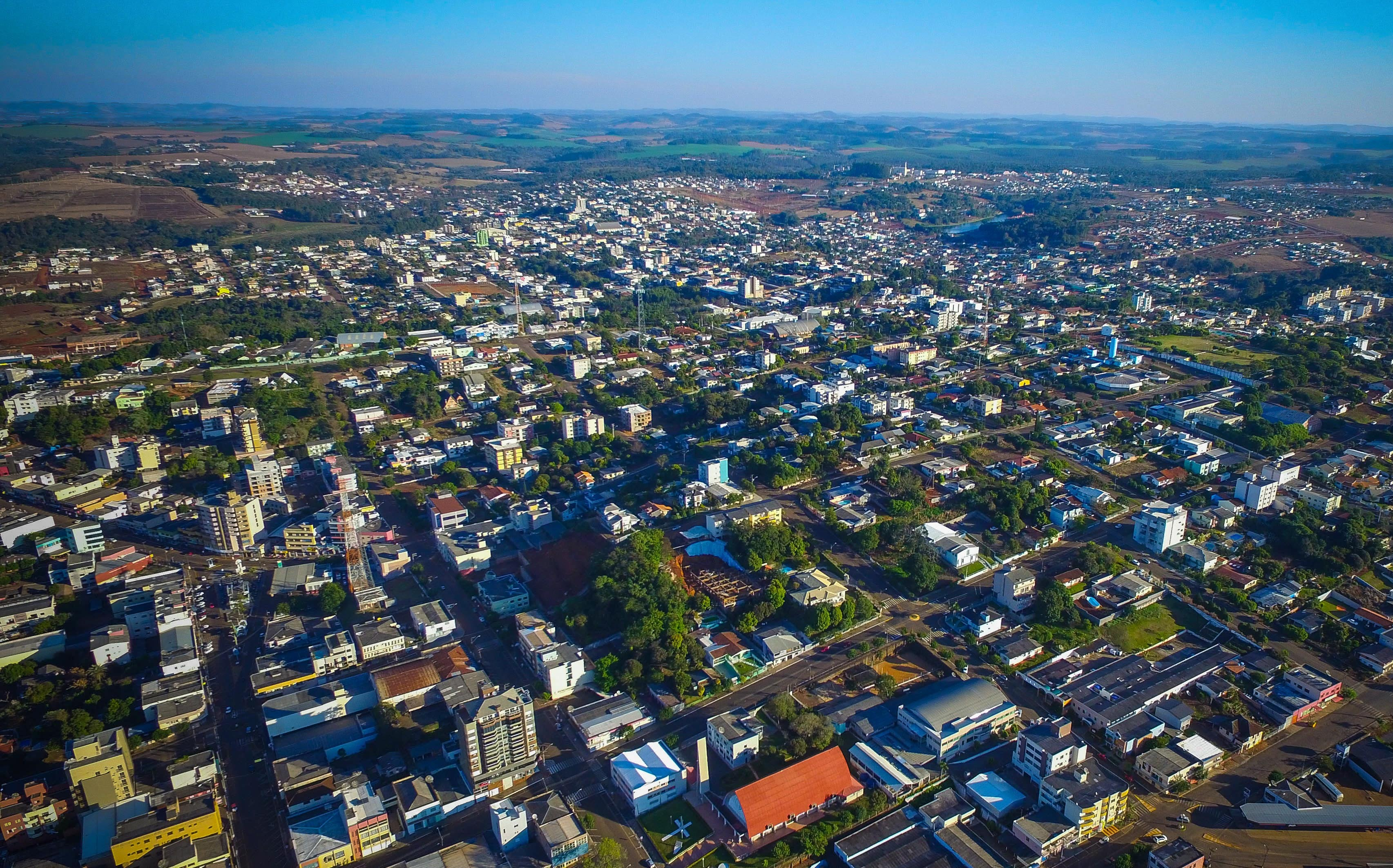 Foto feita no Centro Norte de Dois Vizinhos pela empresa DV Drones em 2016.